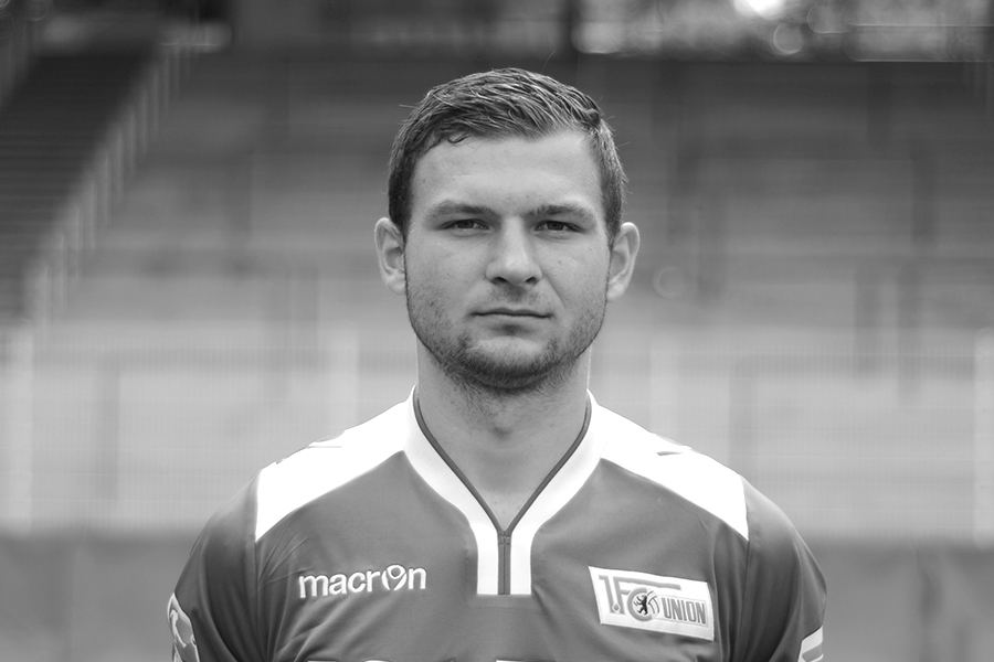 Mannschaftsfoto 2015/16